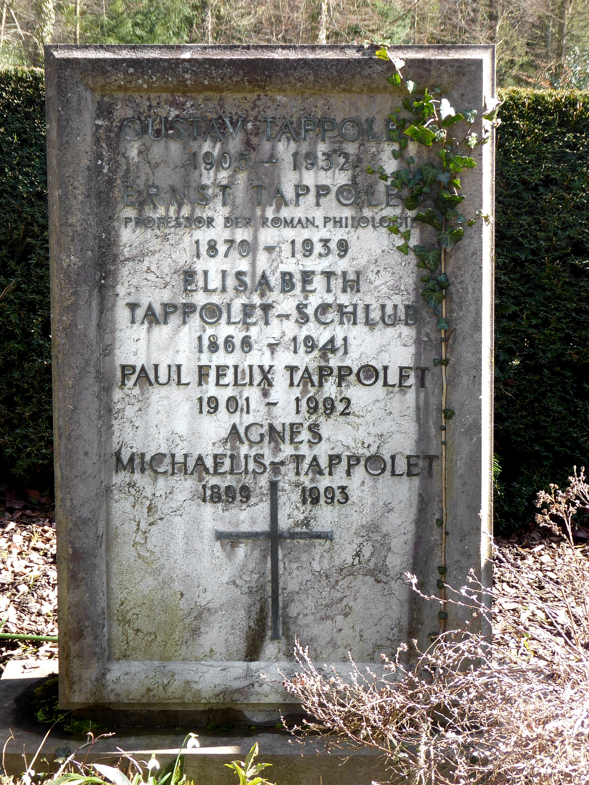 Ernst Tappolet-Schlub (1870–1939) o. Prof. für romanische Philologie an der Univ. Basel, Familiengrab auf dem Friedhof Hörnli, Riehen, Basel-Stadt